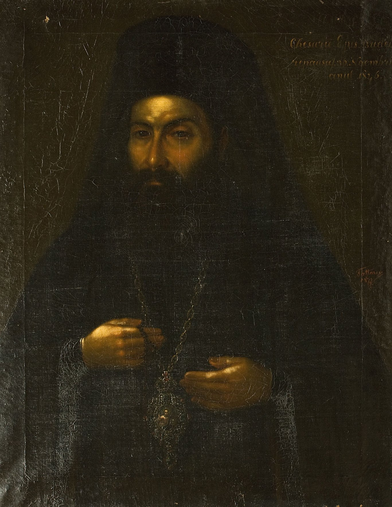 Portretul lui Chesarie - Episcopul Buzăului, ulei/pânză, 0,71x0,58m - Muzeul Gheorghe Tattarescu